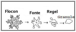 Processus de formation de granules de glace : flocons de neige fondant partiellement dans une couche d'air au-dessus de 0C puis regelant.